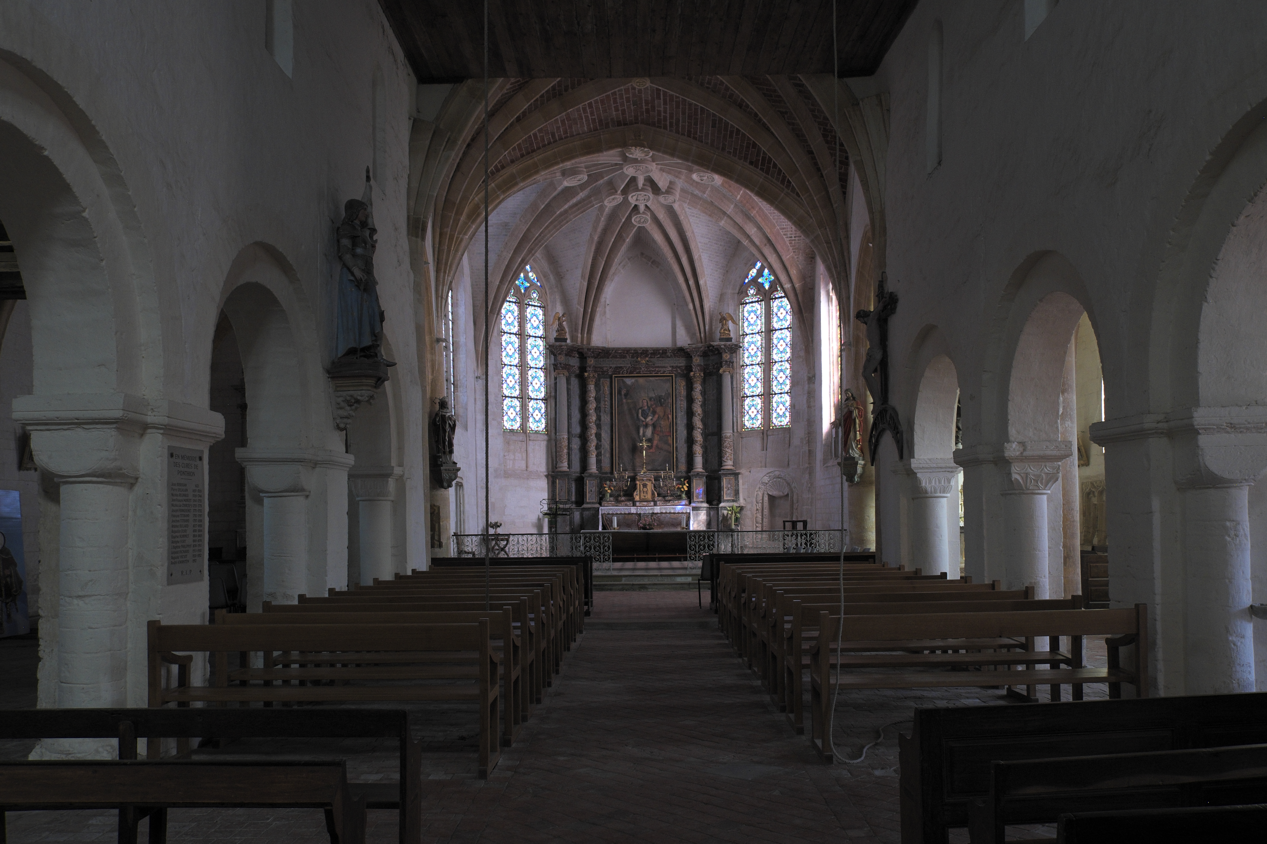 Katholische Kirche Saint-Symphorien in Ponthion im Département Marne in der Region Grand Est/Frankreich, Innenraum